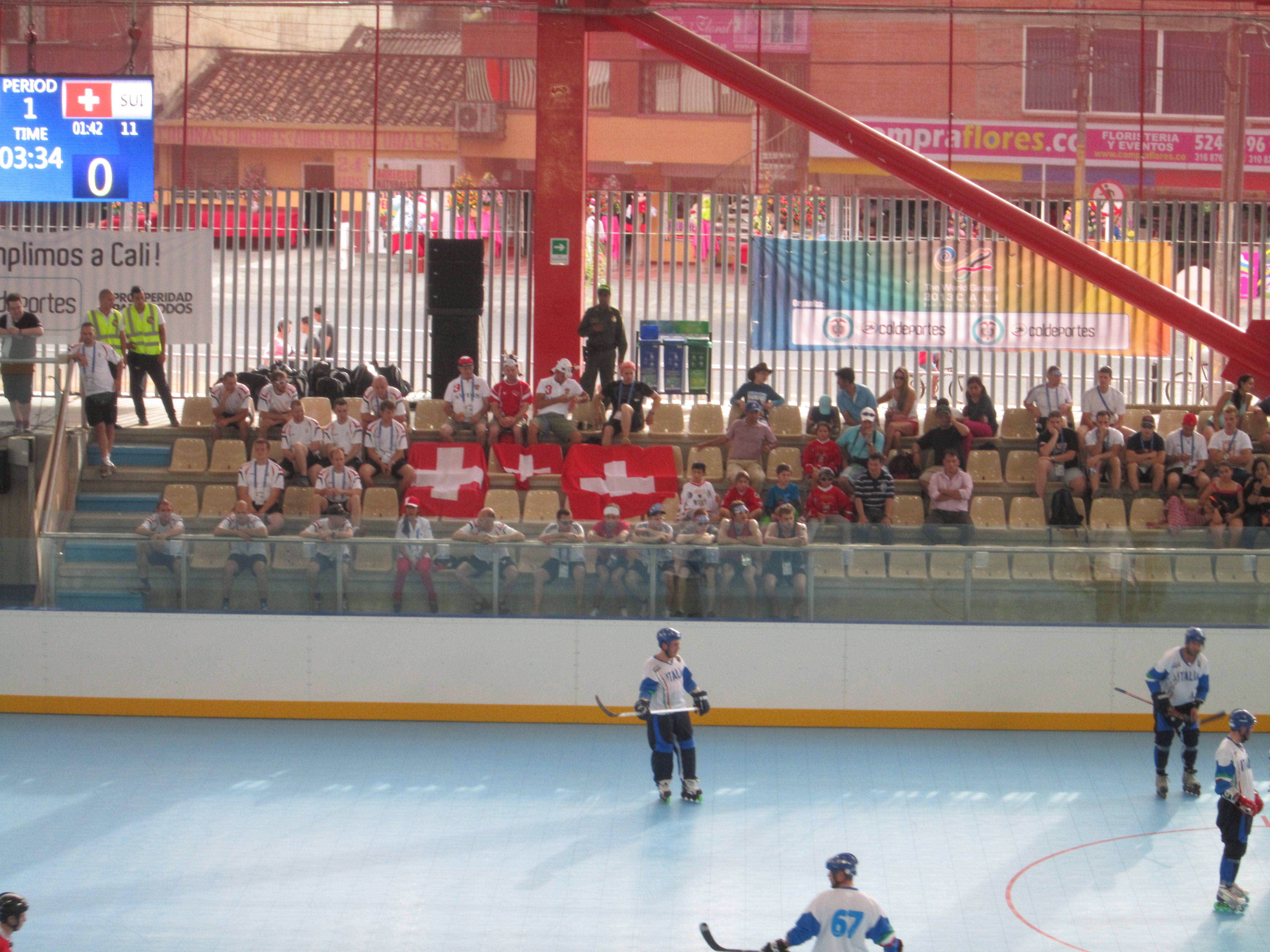 Fanáticos y deportistas Suizos en el coliseo de hockey.